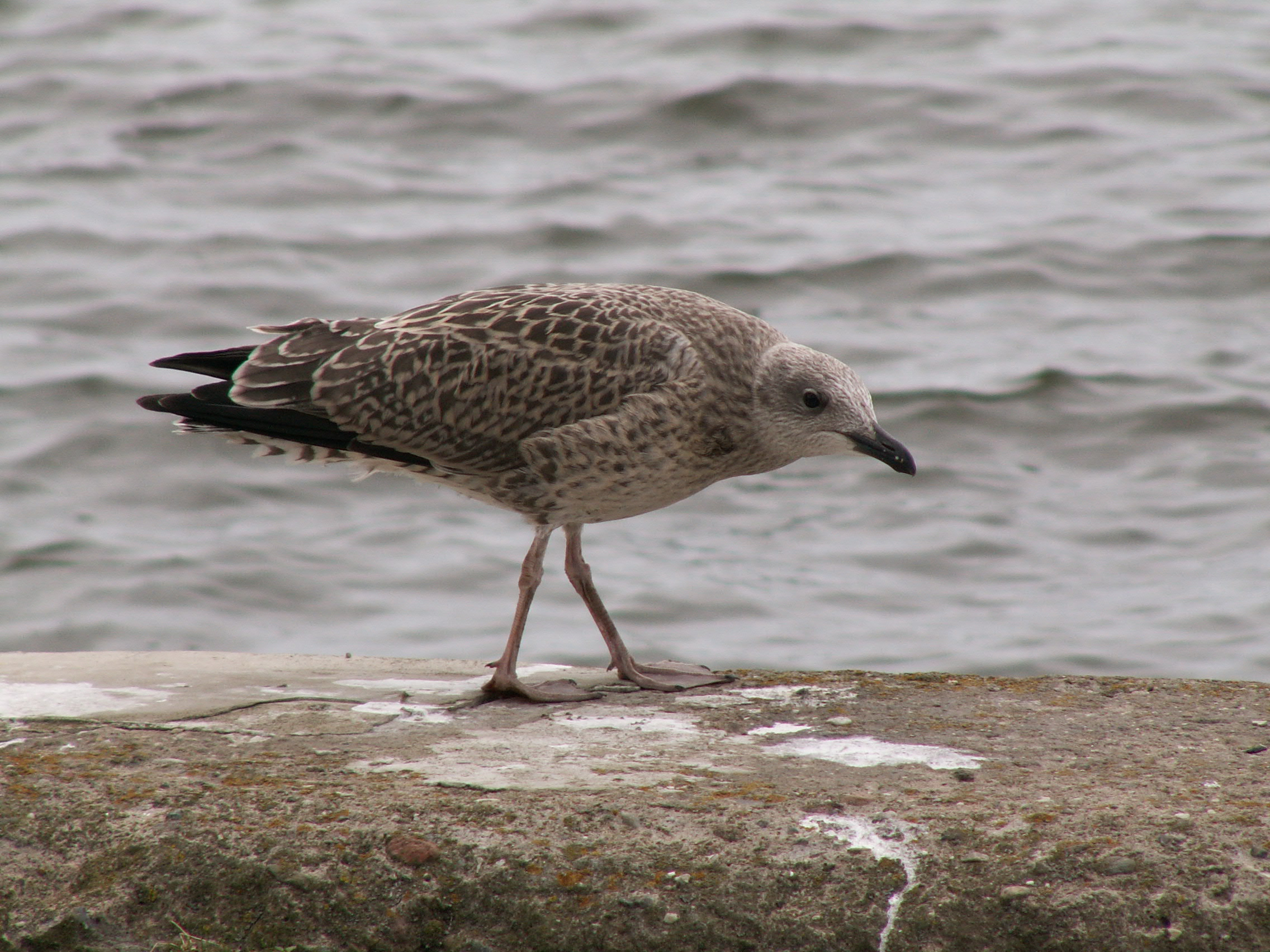 Mewa żółtonoga Mewa srebrzysta - osobnik młody.